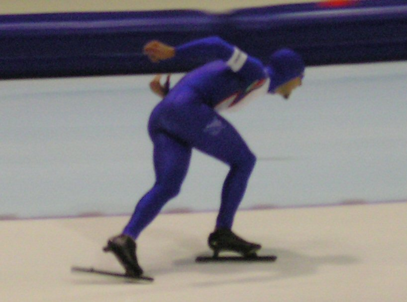 De foto is gemaakt tijdens de World Cup Finales in Heerenveen.